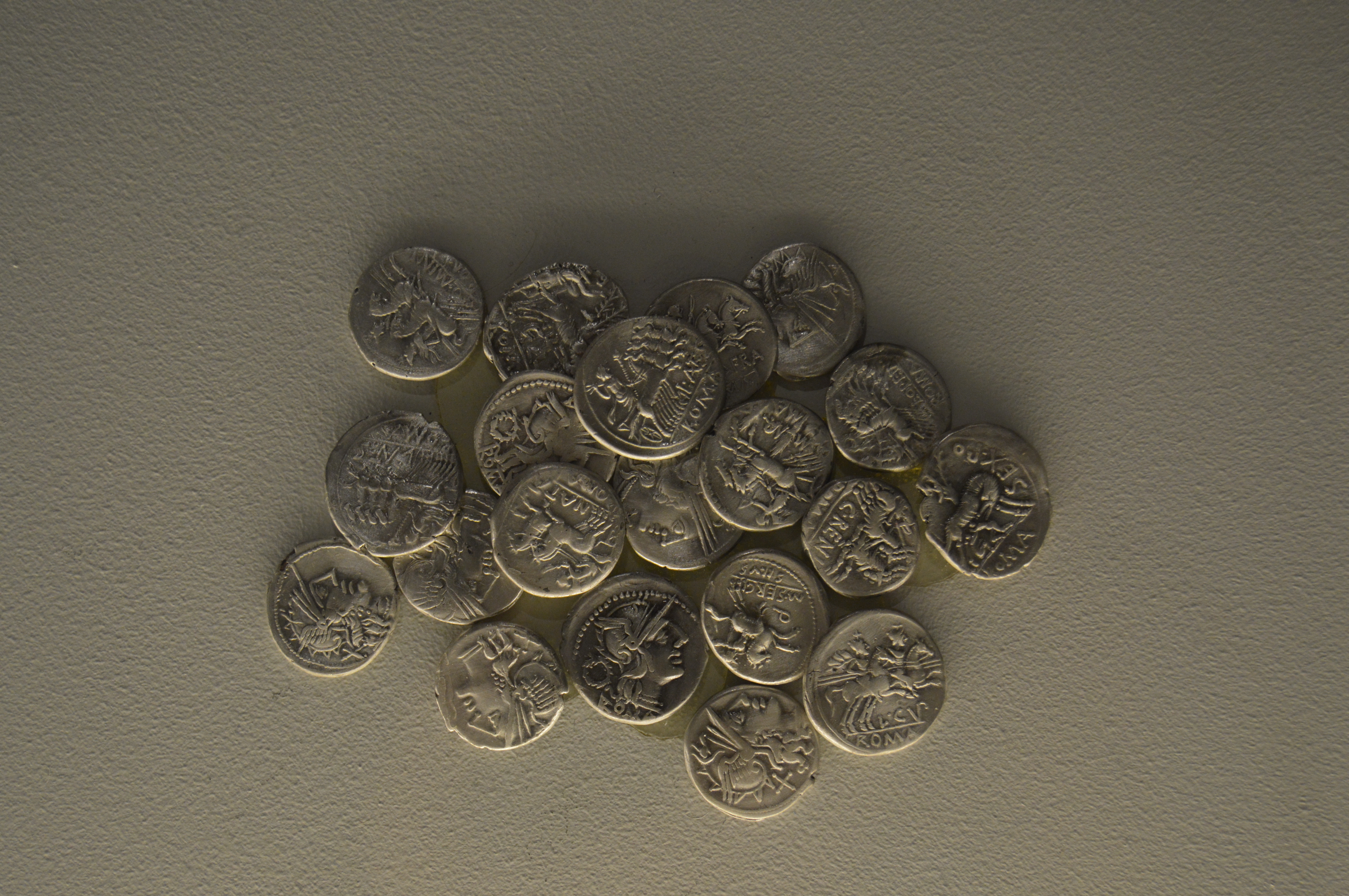 (siglo II a.n.e.)